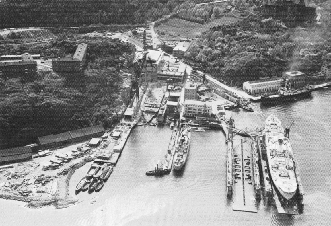 Vy över Finnboda varv med Finnberget till vänster. I flytdockan ligger fartyget M/S Birger Jarl.